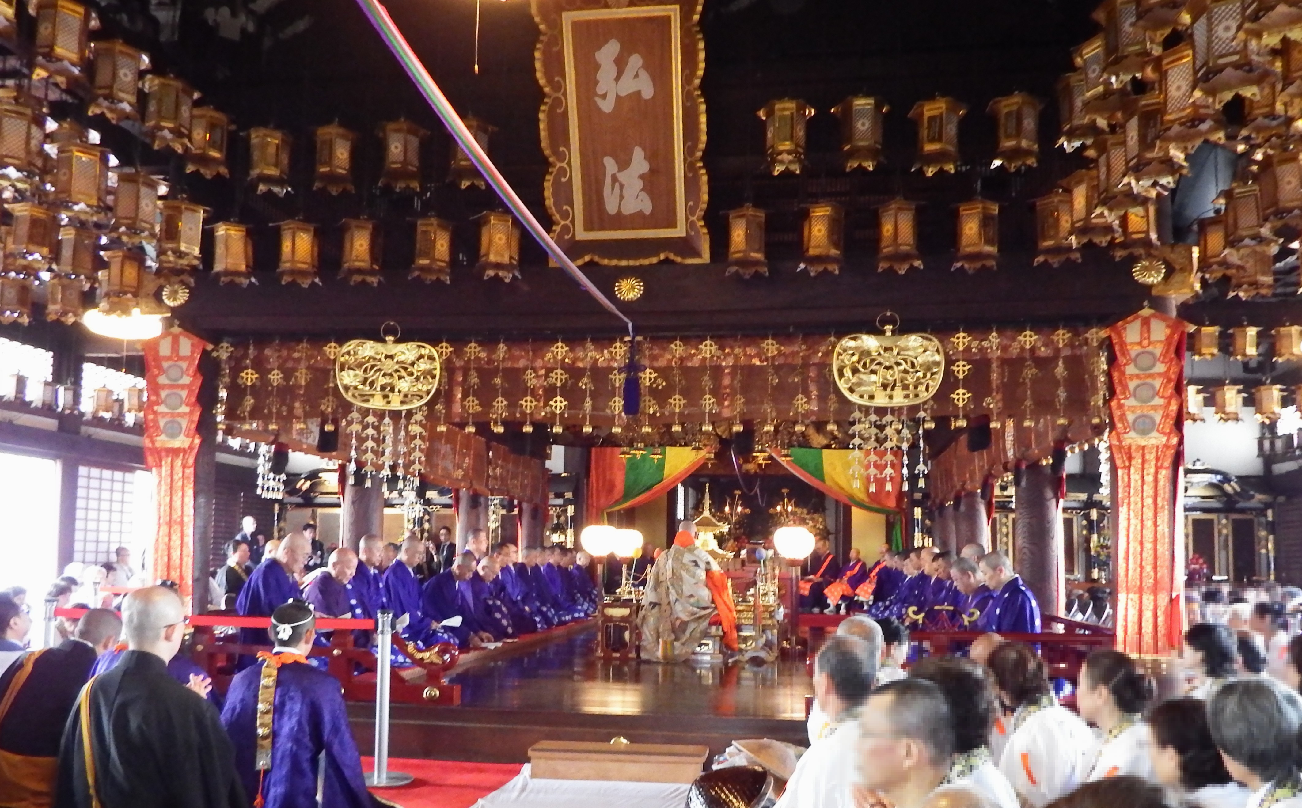 開創１２００年善通寺御影堂での法要（2014.5.9）